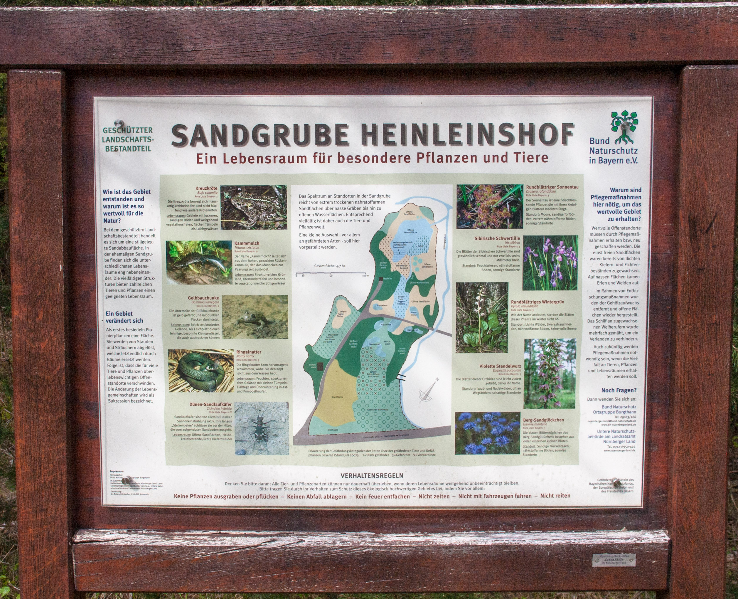 Sandgrube Heinleinshof, Burgthann, Geschützte Landschaftsbestandteil